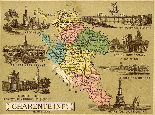 Carte de la Charente-Inférieure réalisée au XIXe siècle